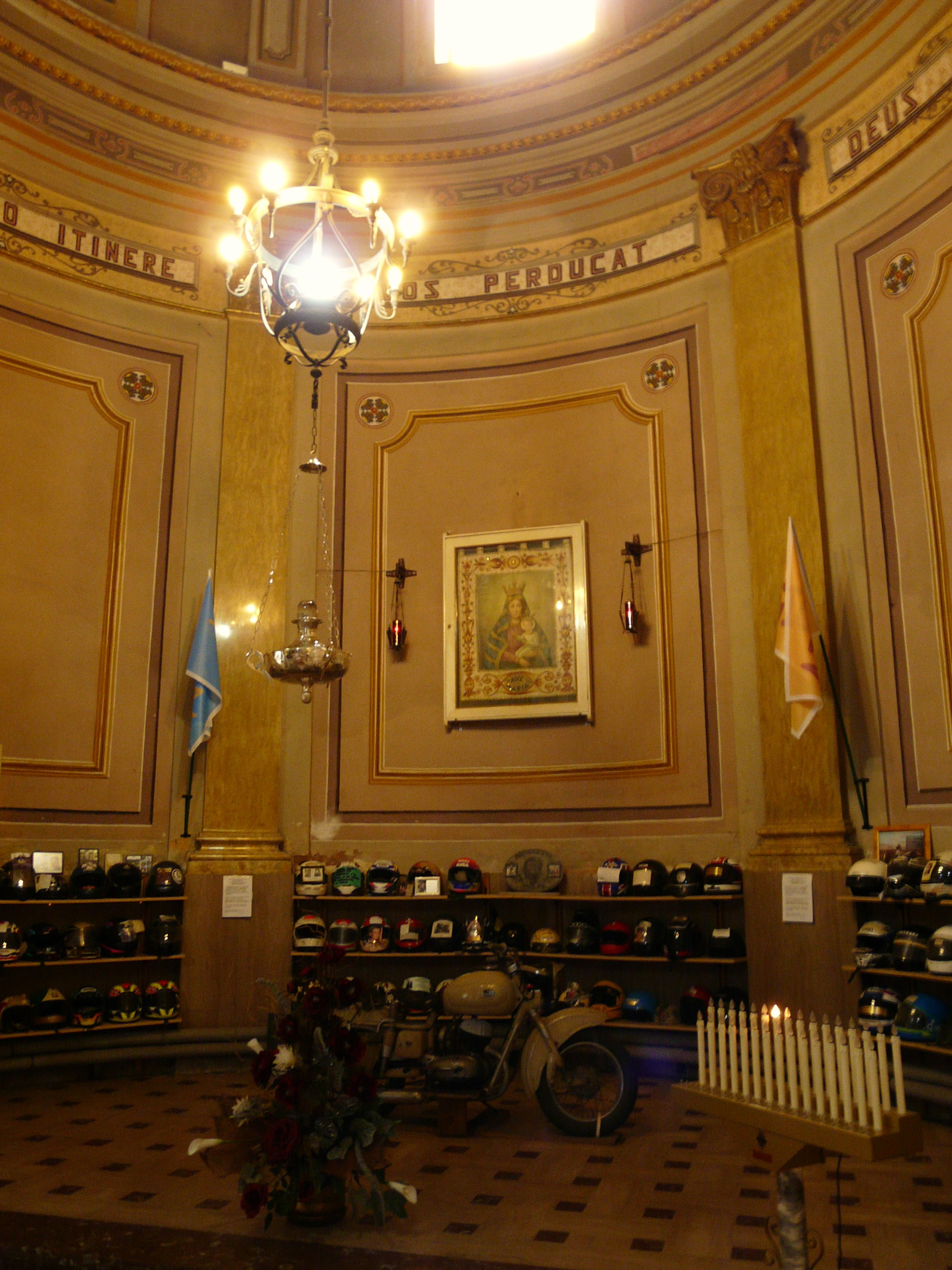 Cappella del motociclista del santuario della Creta, Castellazzo Bormida, Piemonte, Italia